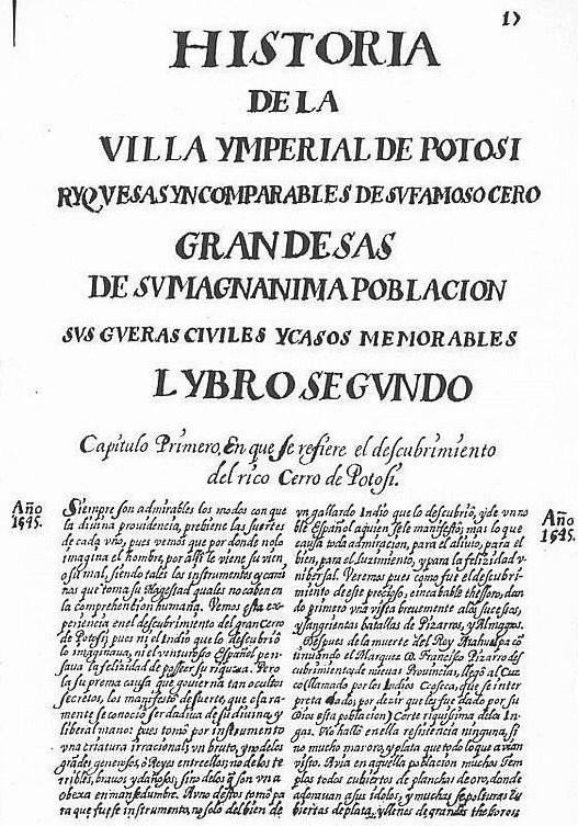 Página inicial del segundo libro de la Historia de la Villa Imperial de Potosí de Bartolomé Arzáns de Orzúa y Vela